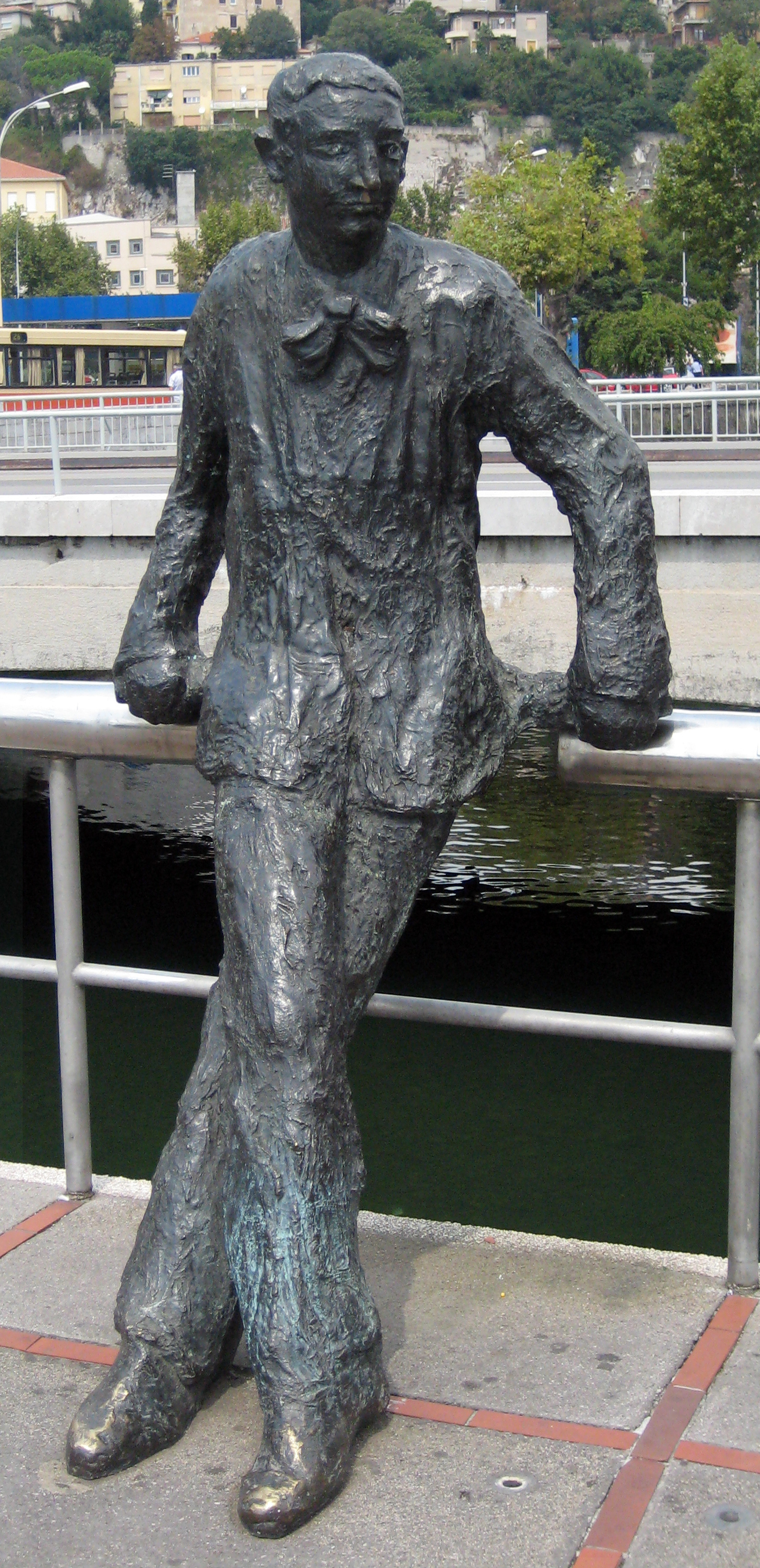 Spomenik Janku Poliću Kamovu na mostu preko Rječine u Rijeci. Godine 1998. Zvonimir Kamenar izrađuje u sadri skulpturu književnika Janka Polić Kamova. Skulptura je po prvi put javno predstavljena ispred Kavane Kontinental gdje ju opaža dipl. ing. arh. Silađin koji ju godinu danas kasnije, ugrađuje u svoj projekt restauracije Strižićevog mosta. Grad Rijeka 2000. postavlja skulpturu J.Polić Kamova na Strižićevom mostu u Rijeci.